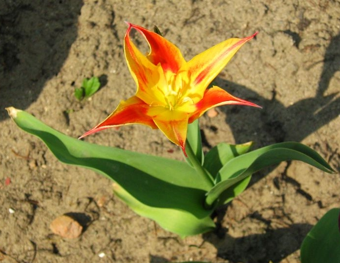 Tulipan (Tulipa tschimganica Botschantzeva) z mojego ogrodu